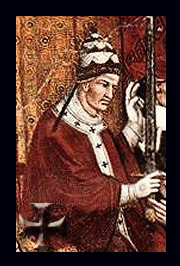 Alessandro III